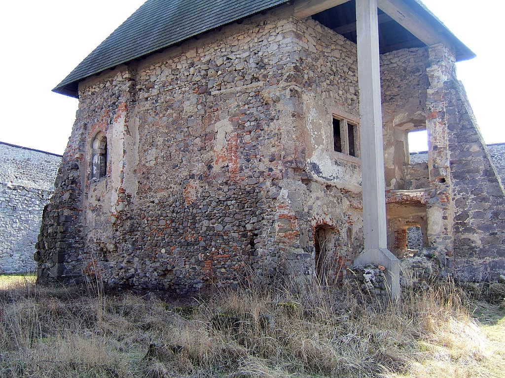 zvyšok kostola